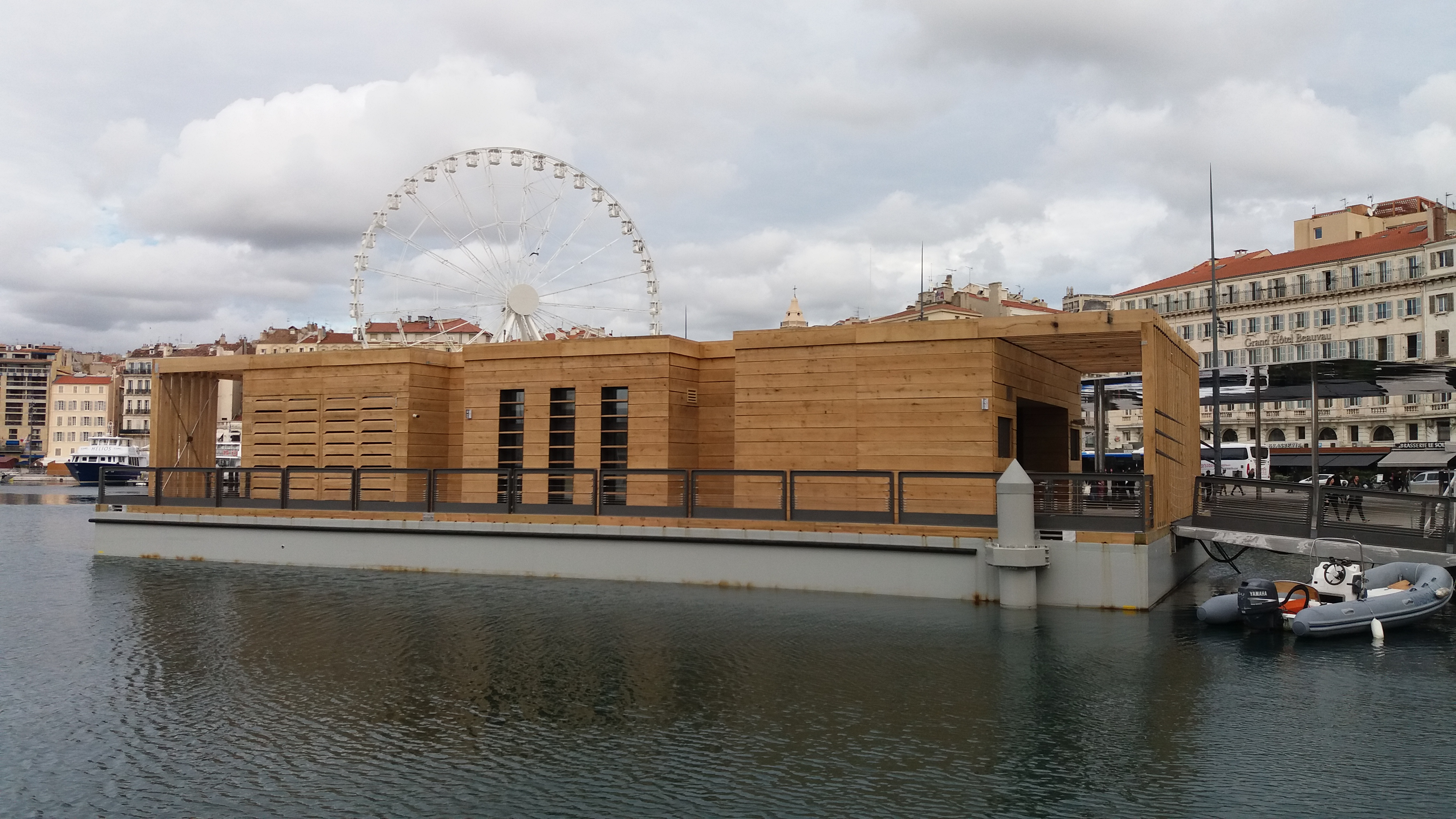 La gare maritime du Vieux-Port de Marseille (Bouches-du-Rhône, France)